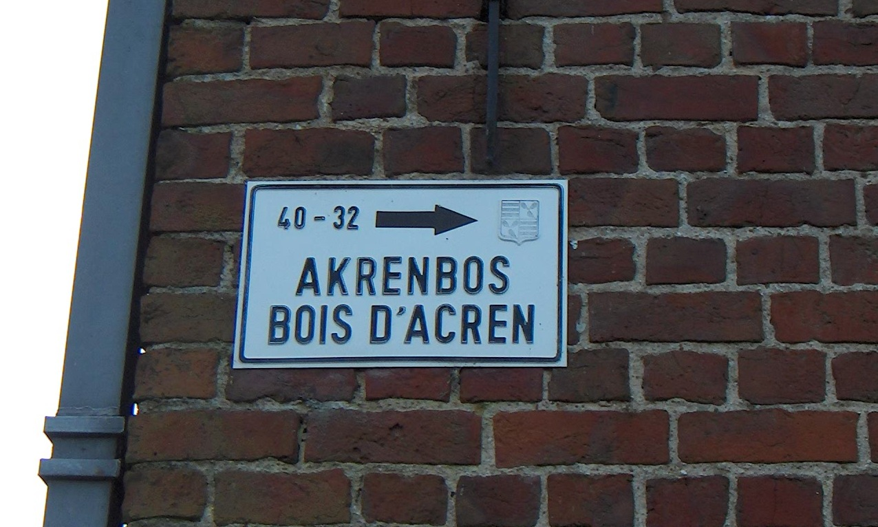 zweisprachiges Straßennamensschild in der Gemeinde Bever (Belgien, Region Flandern, an der Sprachgrenze), im Ortsteil Akrenbos (Niederländisch)/Bois d'Acren (Frz.); die Gemeinde gehört zu den belgischen Gemeinden mit einer besonderen Regelung im Gebrauch der Amtssprache: Bever hat Niederländisch als Amtssprache, es sind aber gewisse Rechte für Französischsprachige vorgesehen.